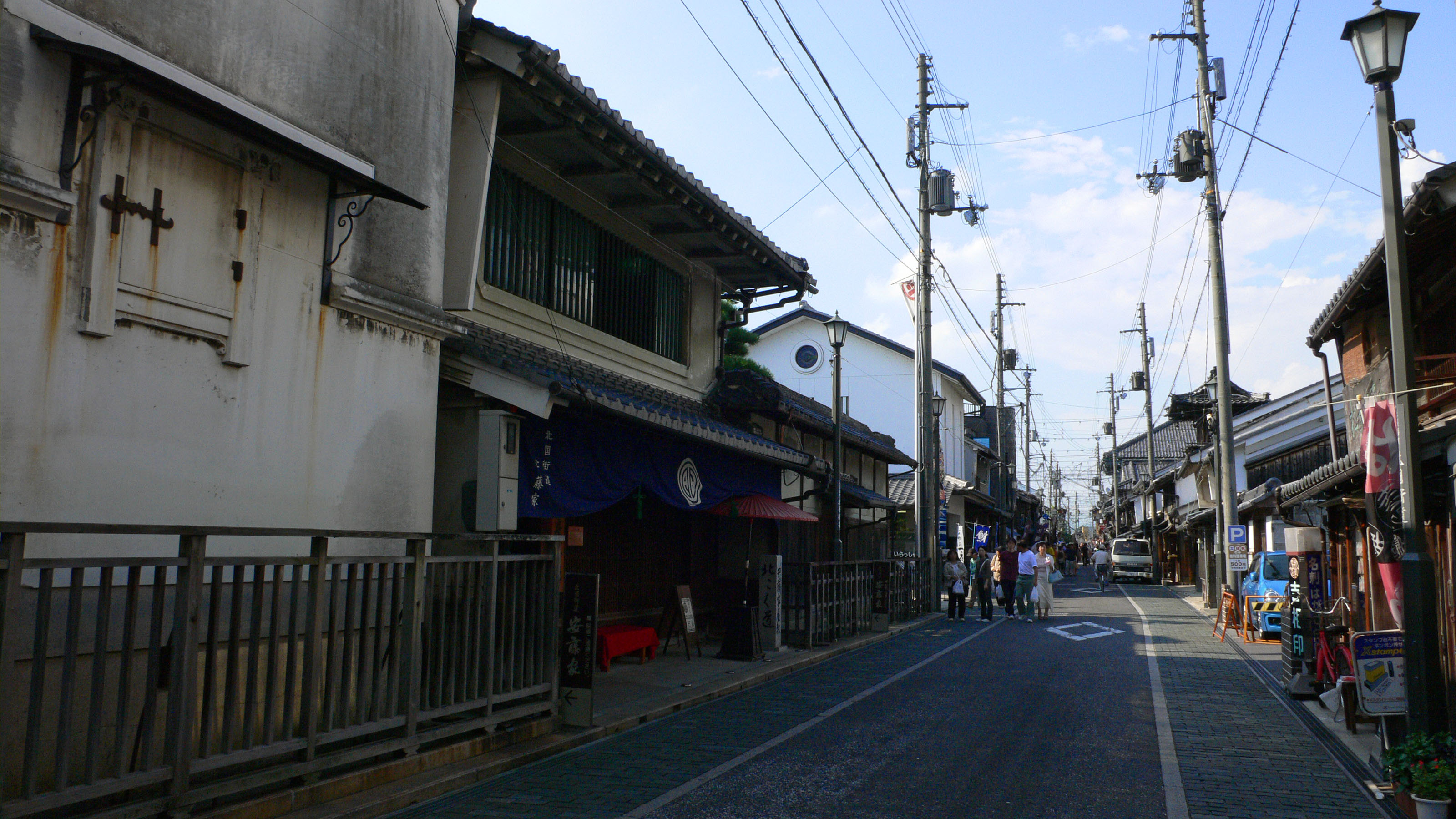 Kurokabe Square in Nagahama, Shiga, Japan